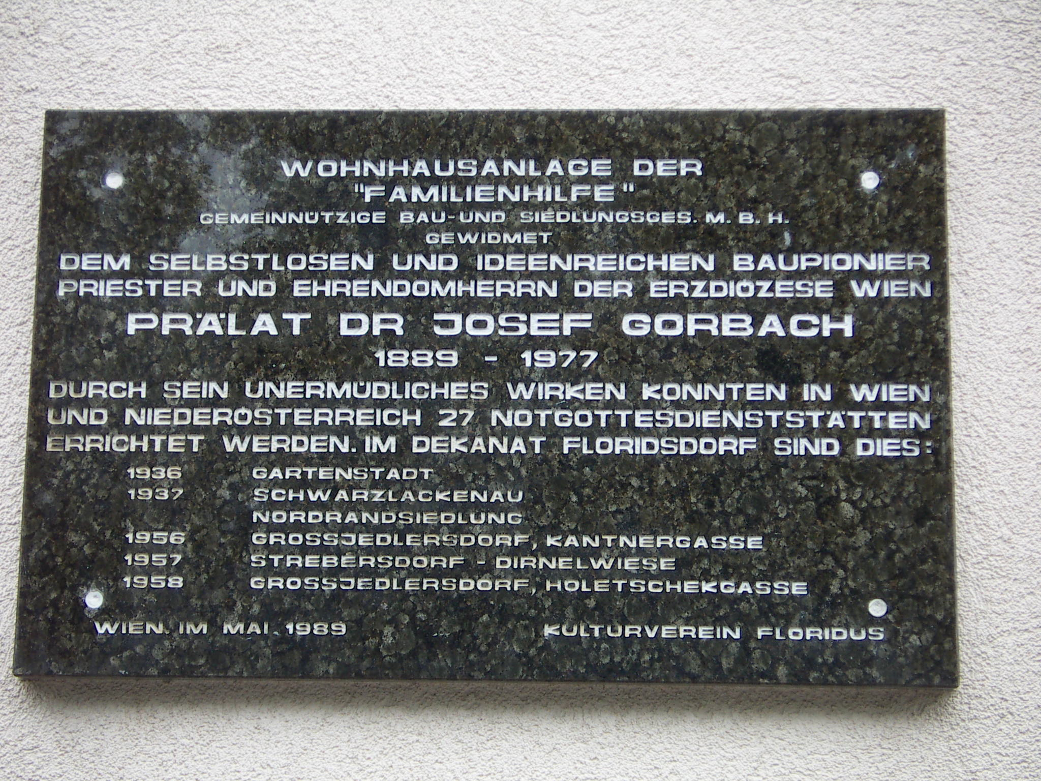 Wohnhausanlage Prälat Dr. Gorbach-Hof in Wien-Jedlesee, Gedenktafel zu Josef Gorbach